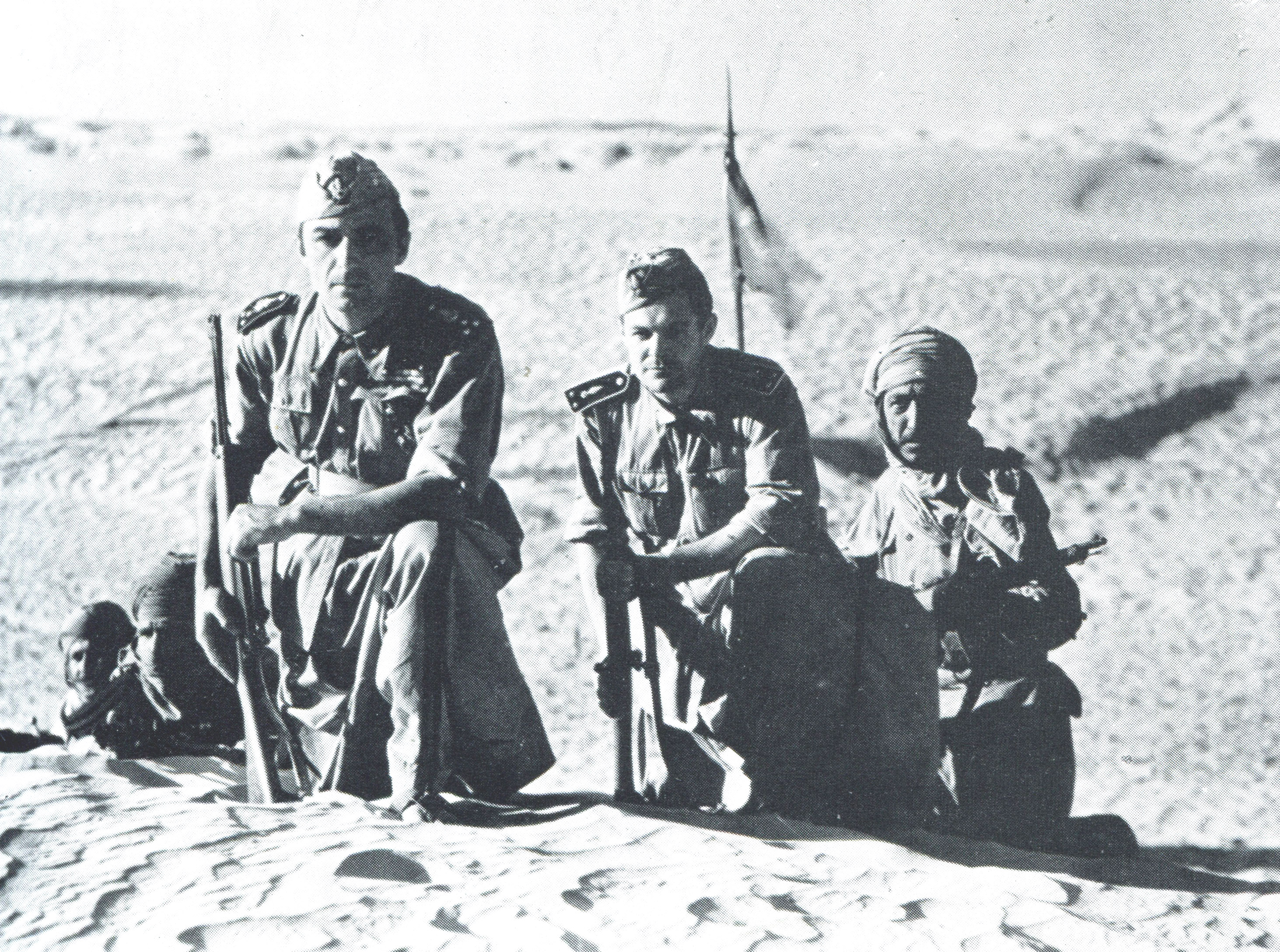 Fosco Giachetti, Antonio Centa e Cesare Polacco ne Lo squadrone bianco (Genina, 1936)